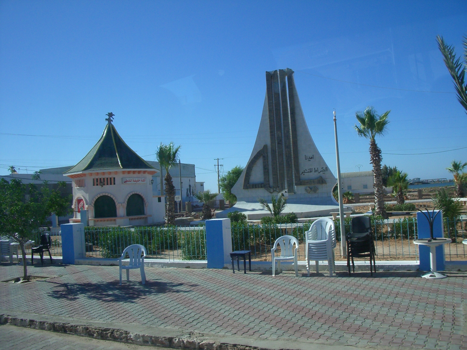 Mahares